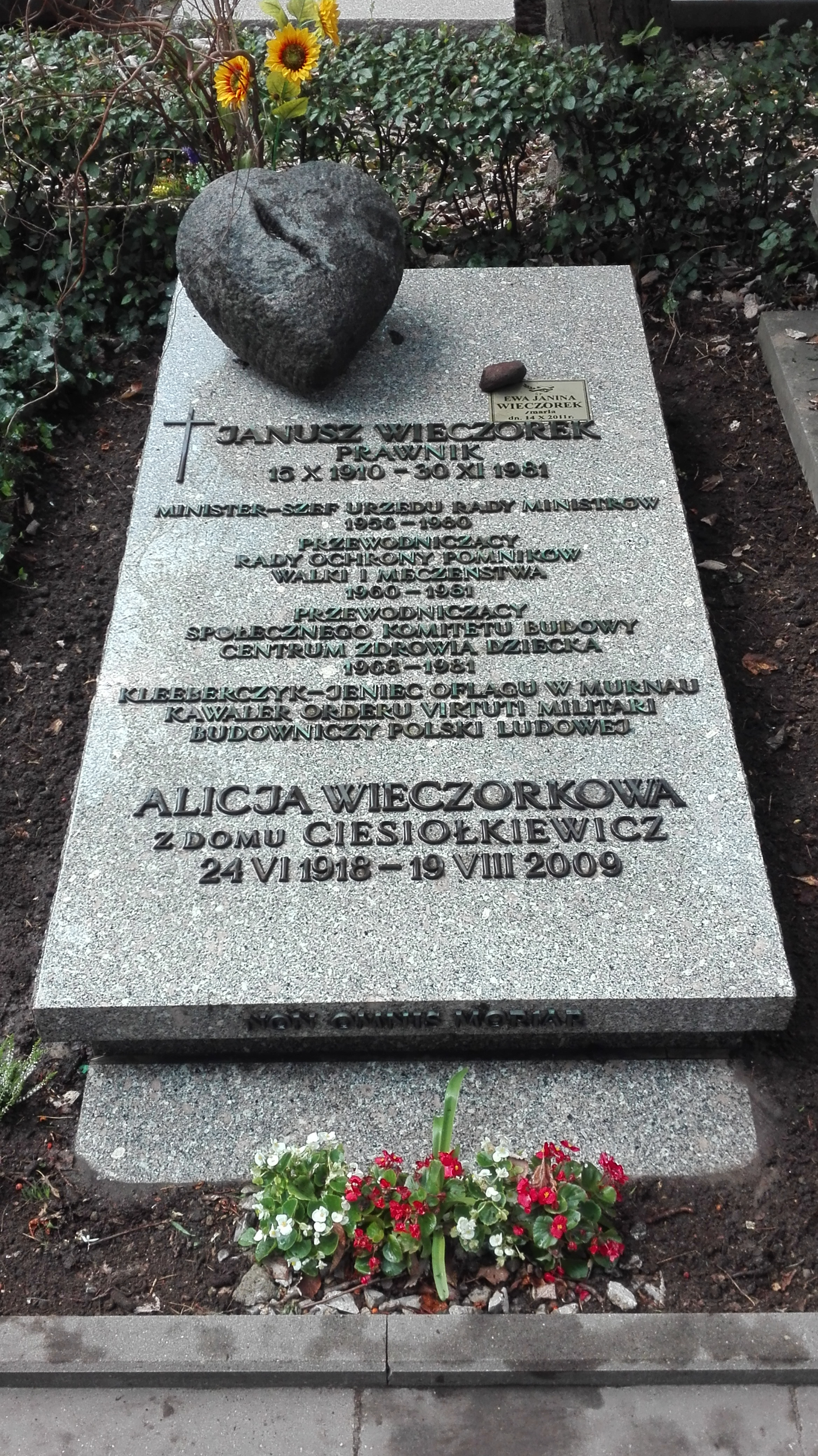 Grób Janusza Wieczorka w Alei Zasłużonych na Cmentarzu Wojskowym na Powązkach – kwatera B 32 tuje, 9 grób